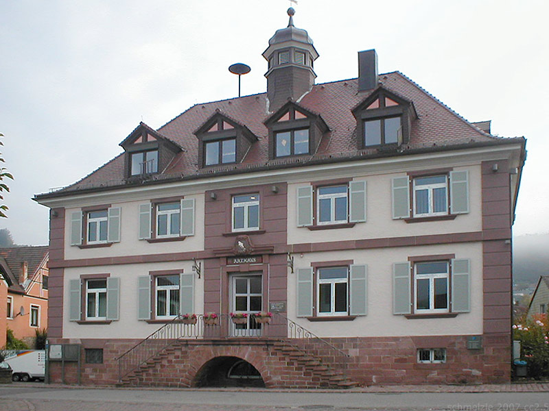 Rathaus in Neckargerach, Baden-Württemberg, Deutschland